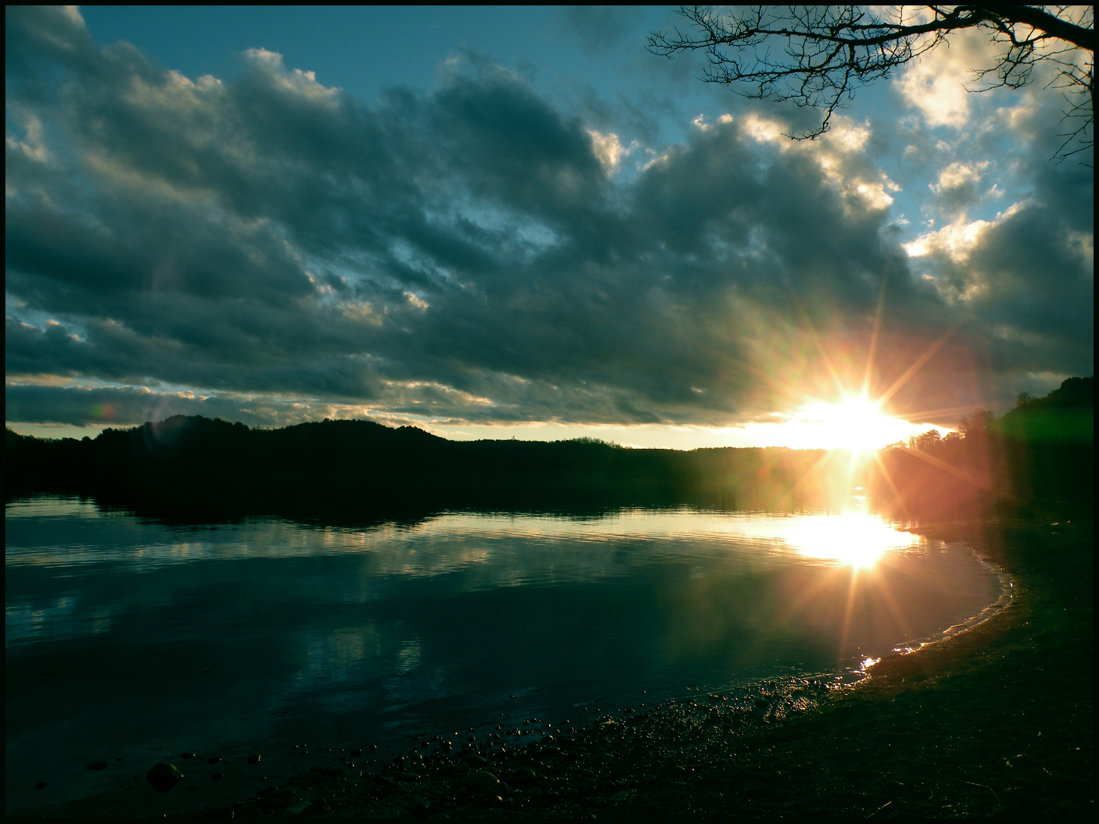 Sunset in Winter.